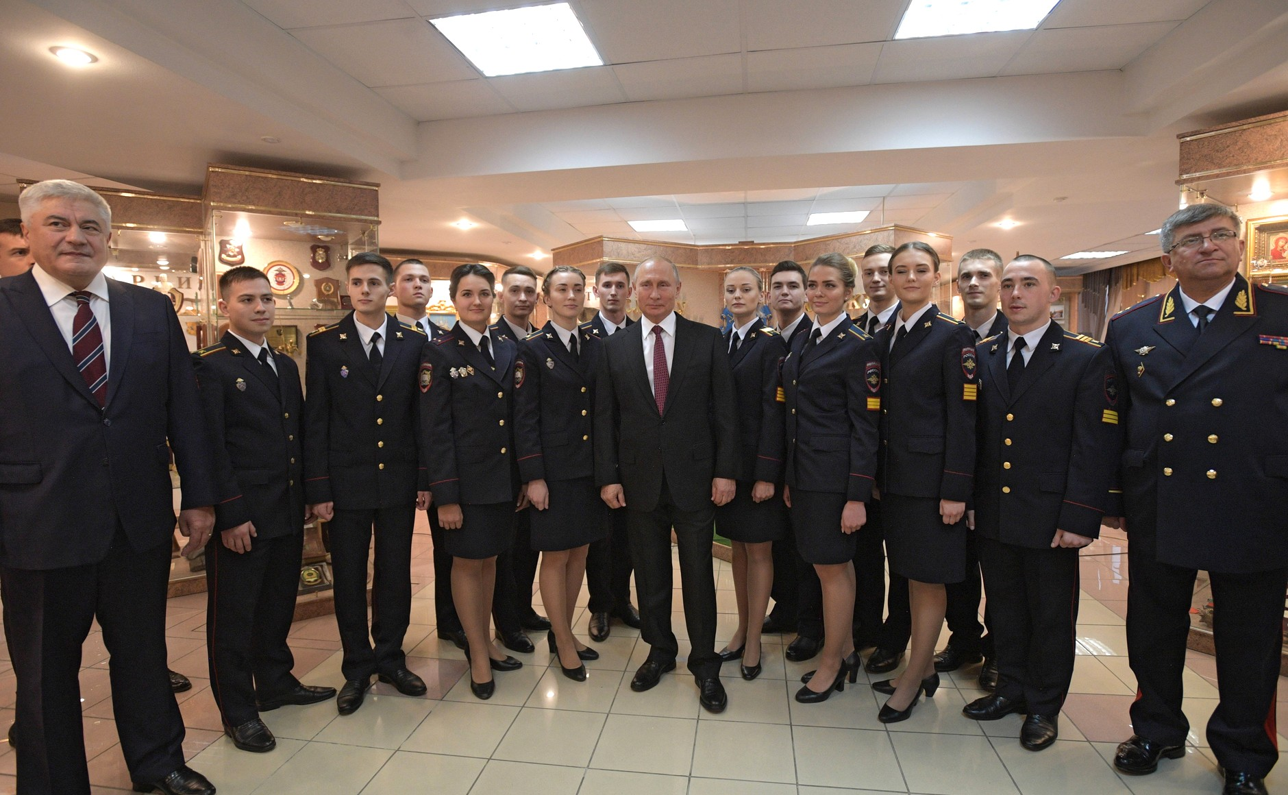 В ходе посещения Московского университета МВД России имени В.Я.Кикотя.